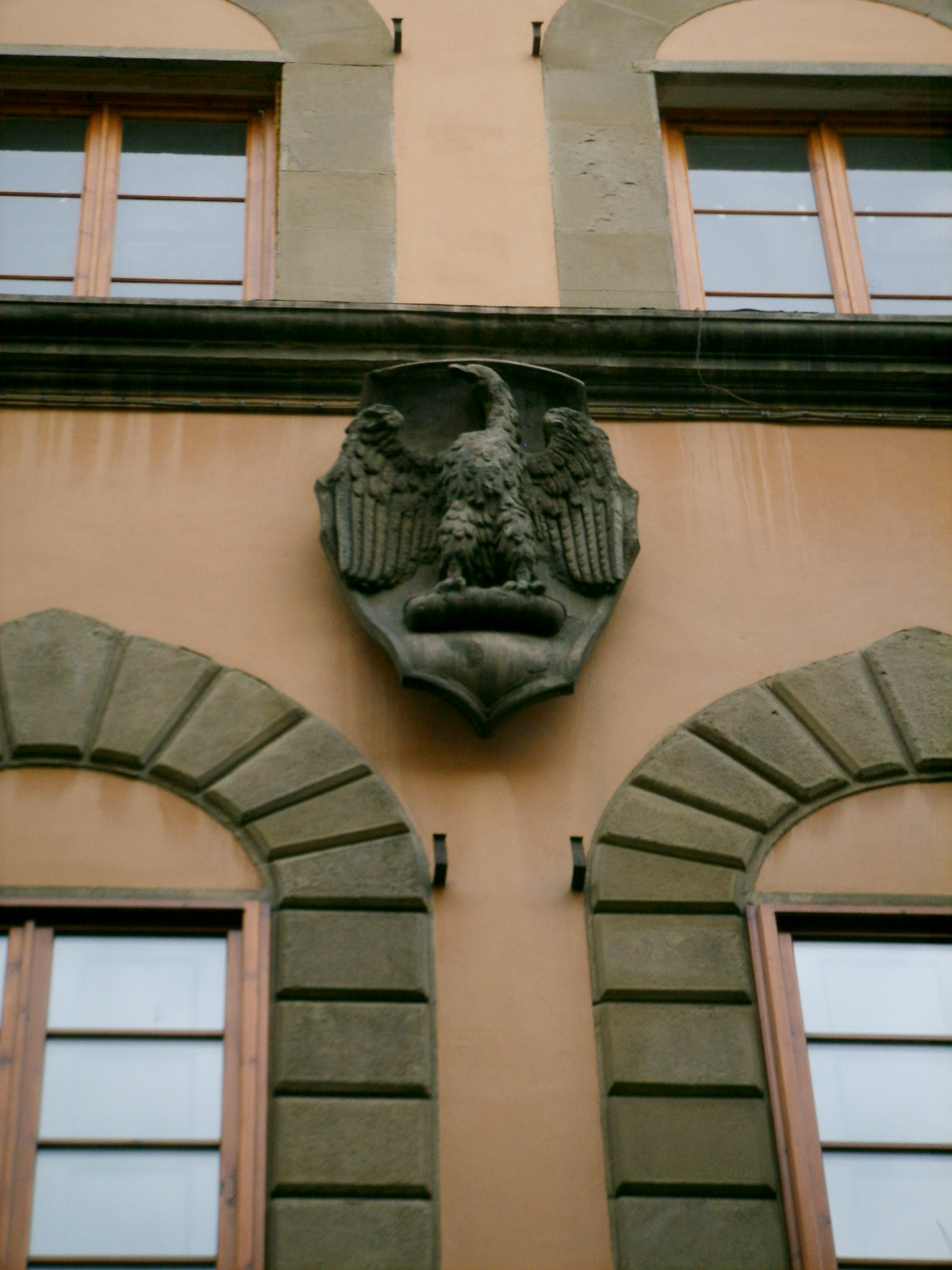 see filename, stemma arte di calimala?